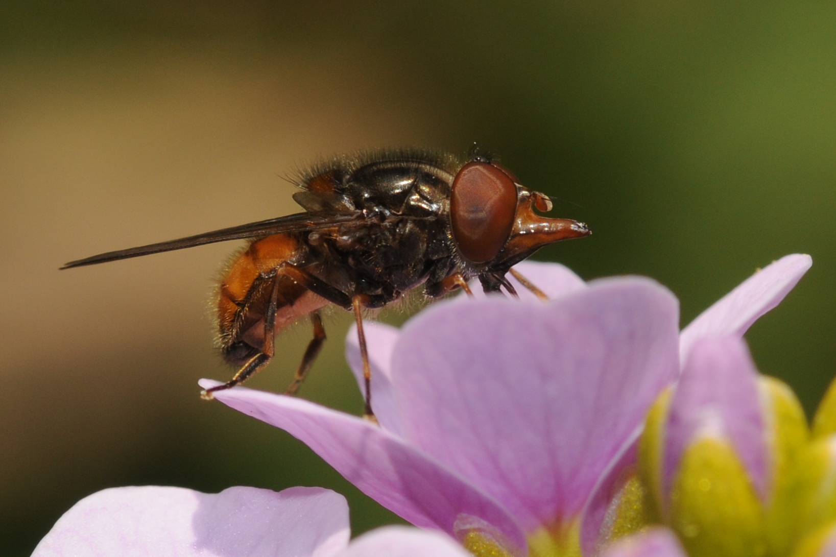 Rhingie sur une fleur.